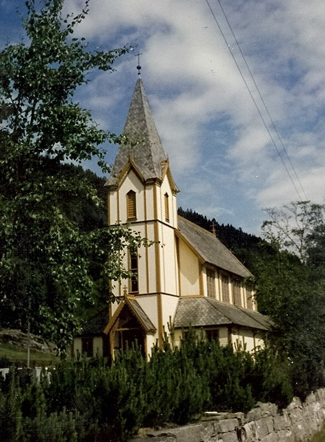 Kyrkjebø kirke